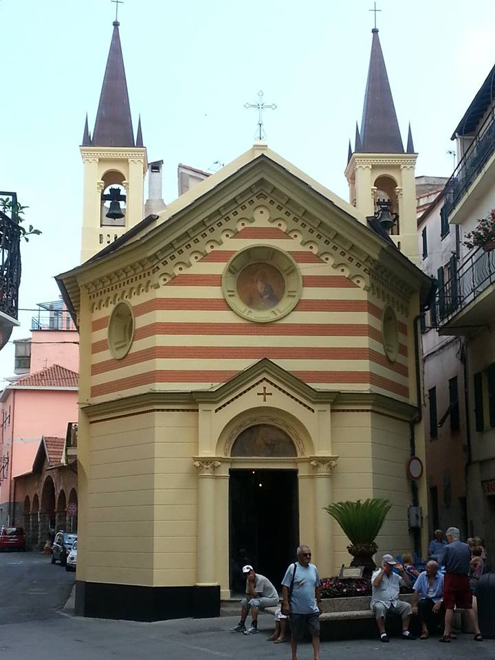 L'Oratorio di Sant'Anna col suo nuovo aspetto appena restaurato dal parroco di Coldirodi.